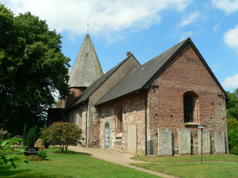 Kosel St. Laurentius